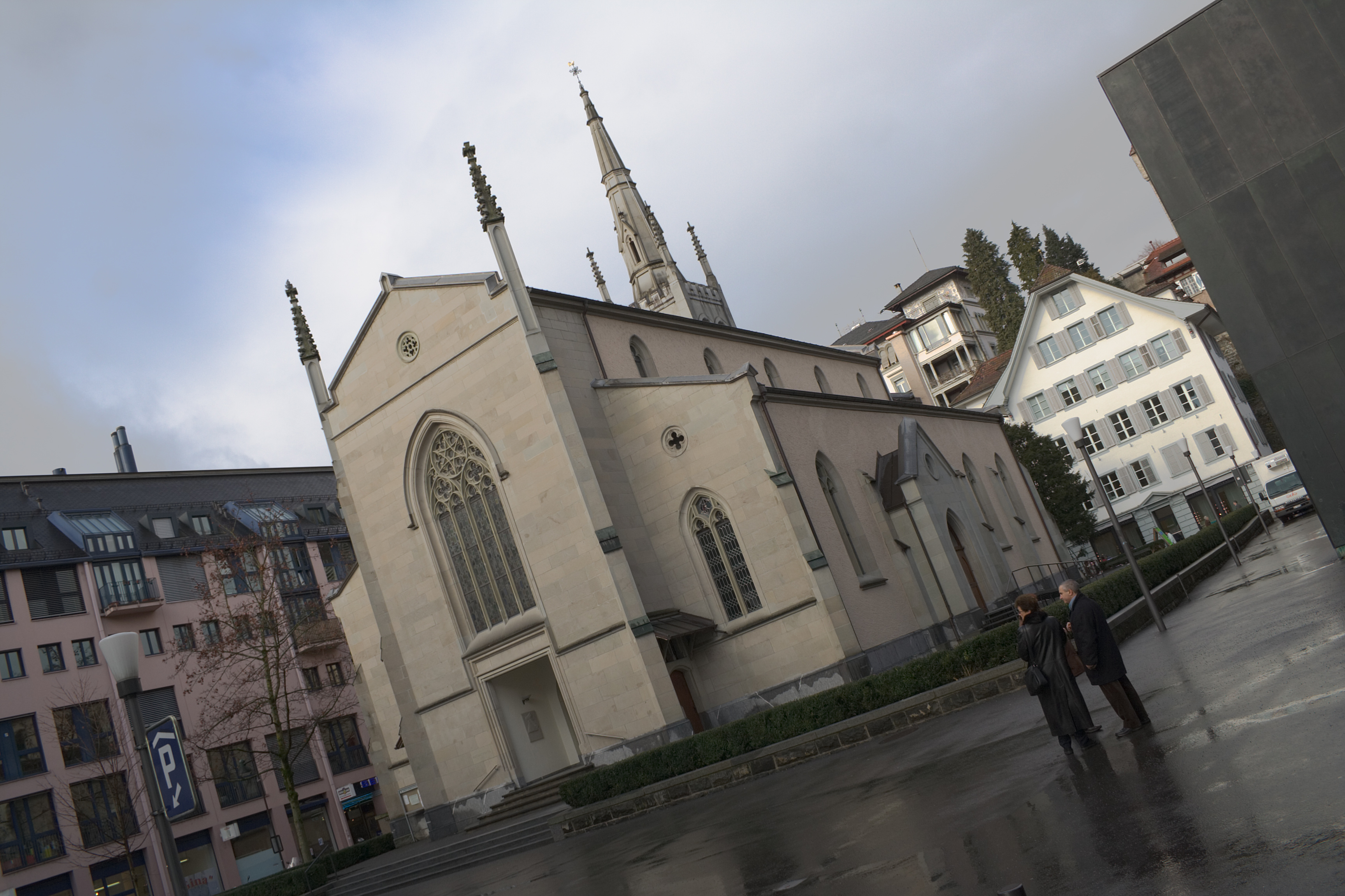 Matthäuskirche von Ferdinand Stadler in Luzern, Schweiz